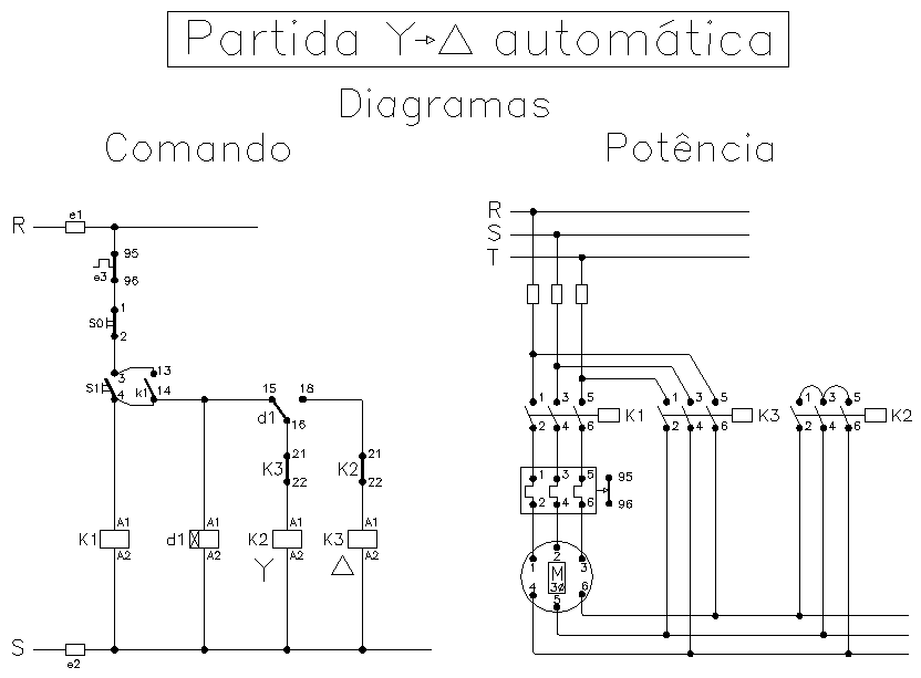 Diagramas de comando e potência de uma partida estrela-triângulo automática.